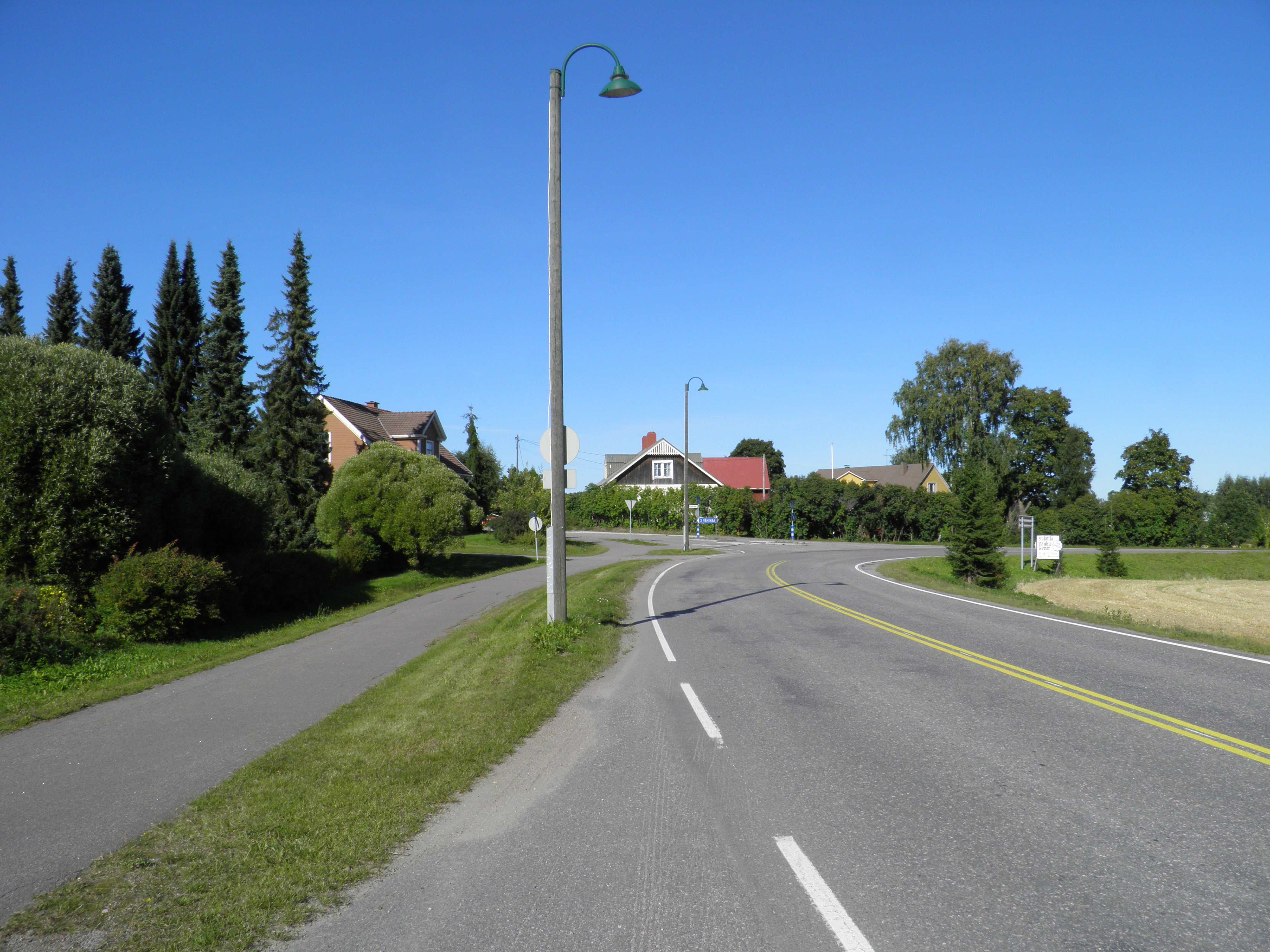 Kurhilan kylää Asikkalassa seututie 317:n varrella.